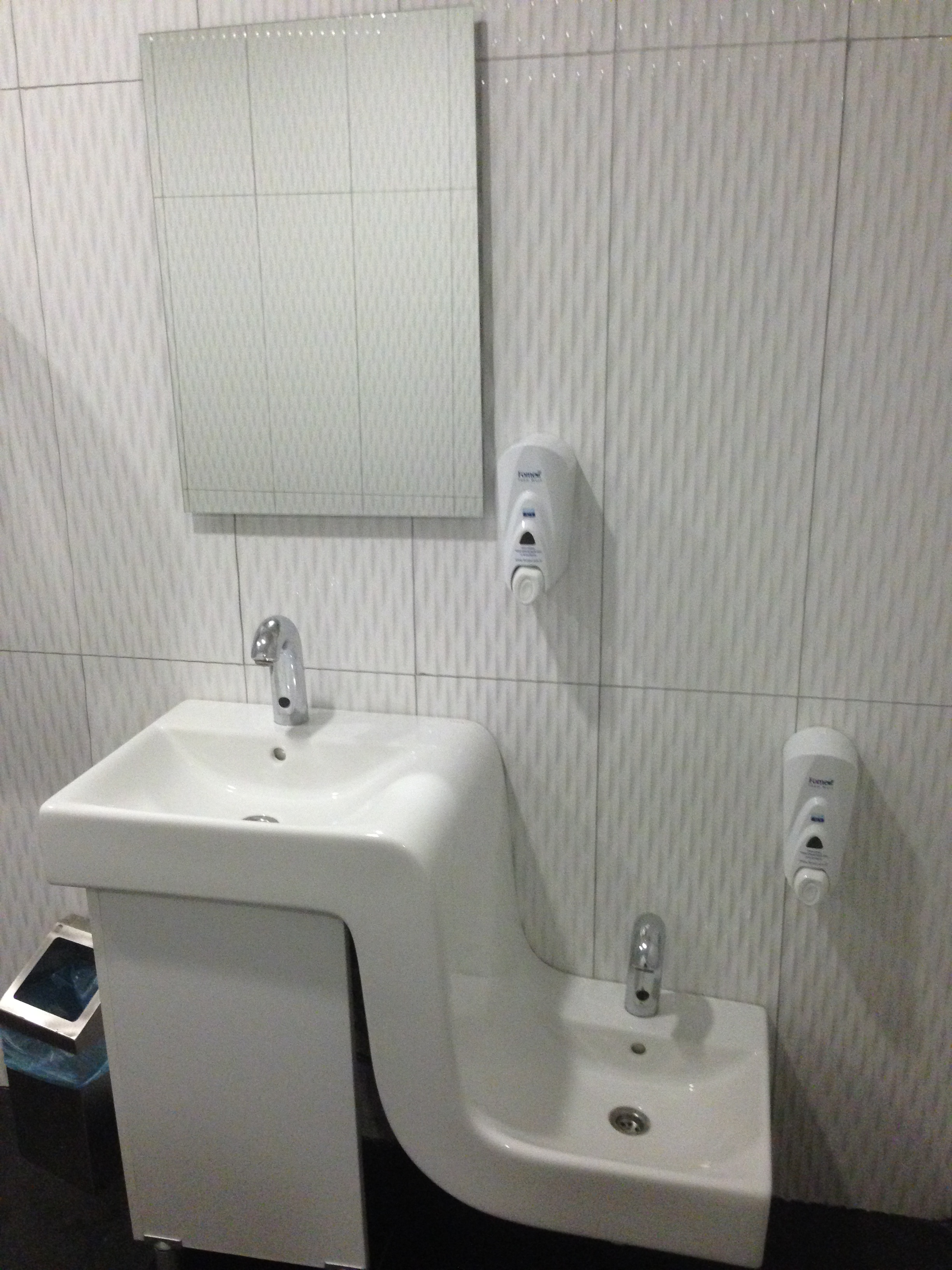 Türkiye'de bir lavabo